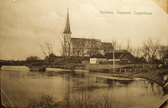 Lüganuse kirik